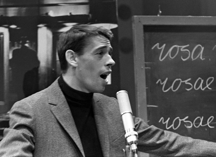 Jacquel Brel tijdens opnamen voor het KRO-televisieprogramma Domino in 1963